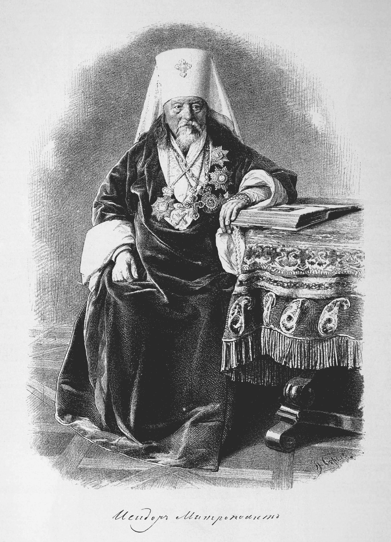 Высокопреосвященный Исидор, митрополит новгородский, санкт-петербургский и финляндский (1892 г.).